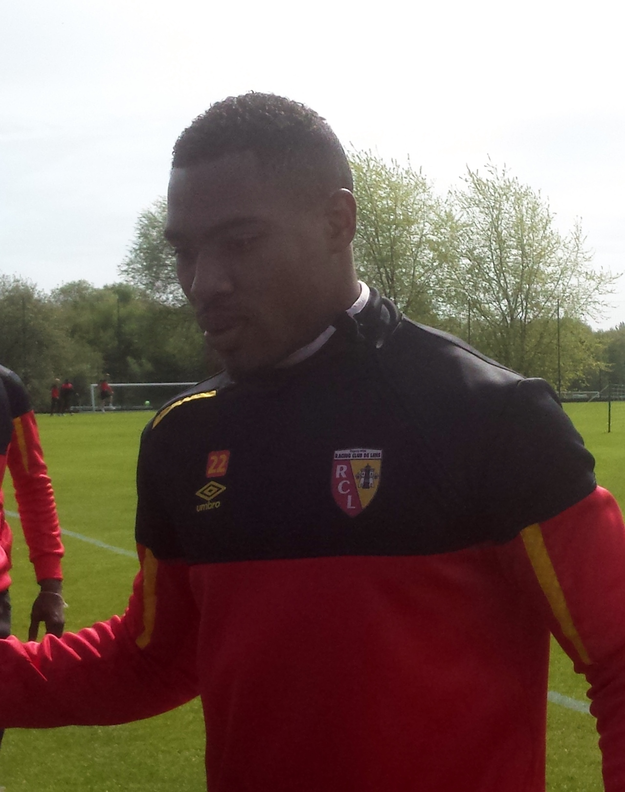 Loïck Landre lors d'un entraînement public du Racing Club de Lens, le 8 mai 2015, sur le terrain San Siro du Centre technique et sportif de La Gaillette.